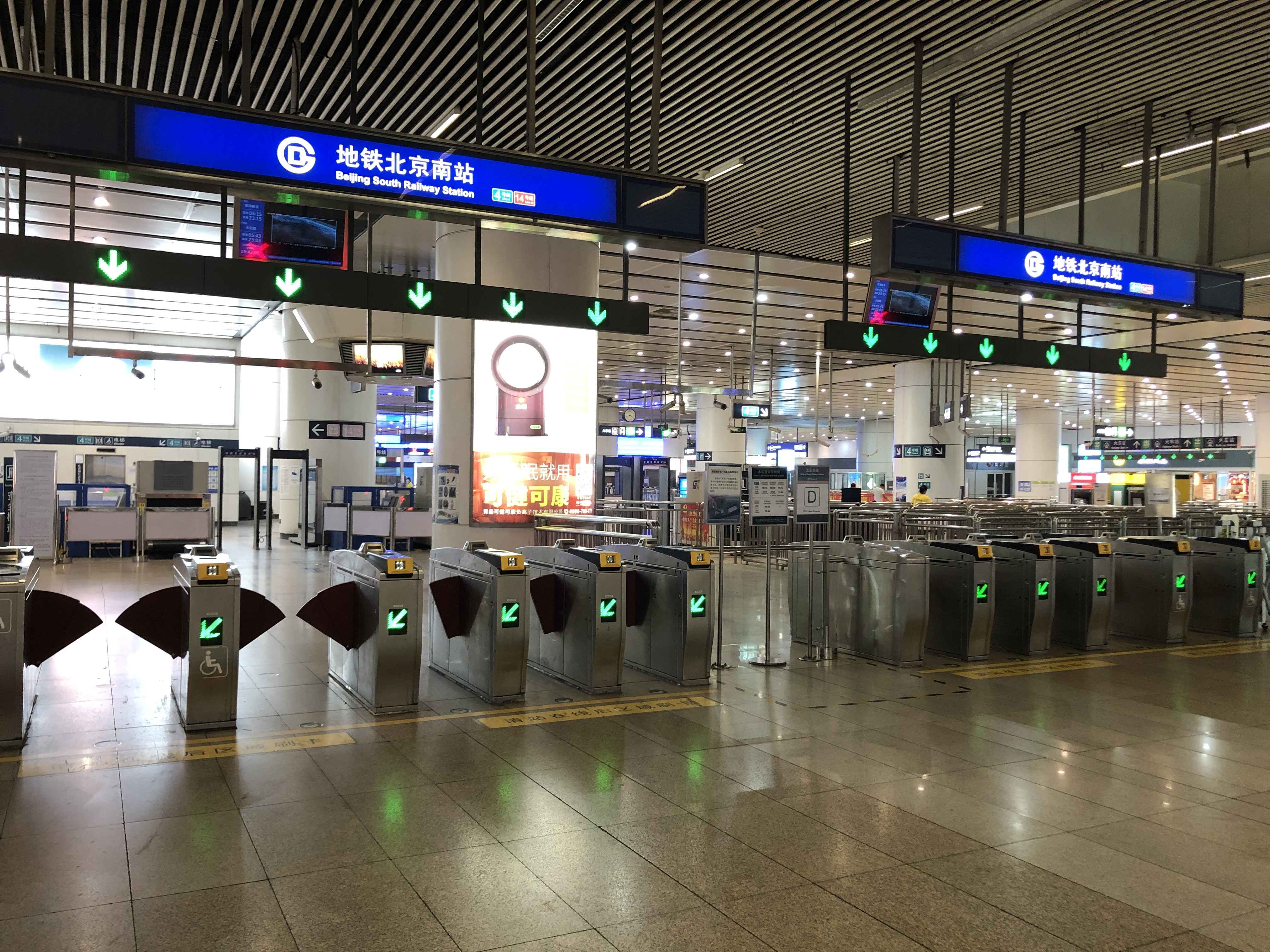 中文（中国大陆）: 北京地铁北京南站D口